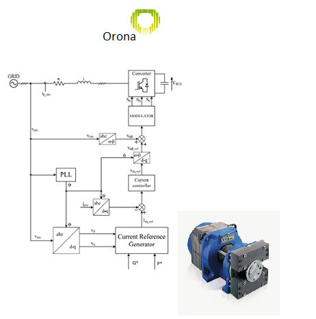 Motorraren kontrola transformatuak erabiliz